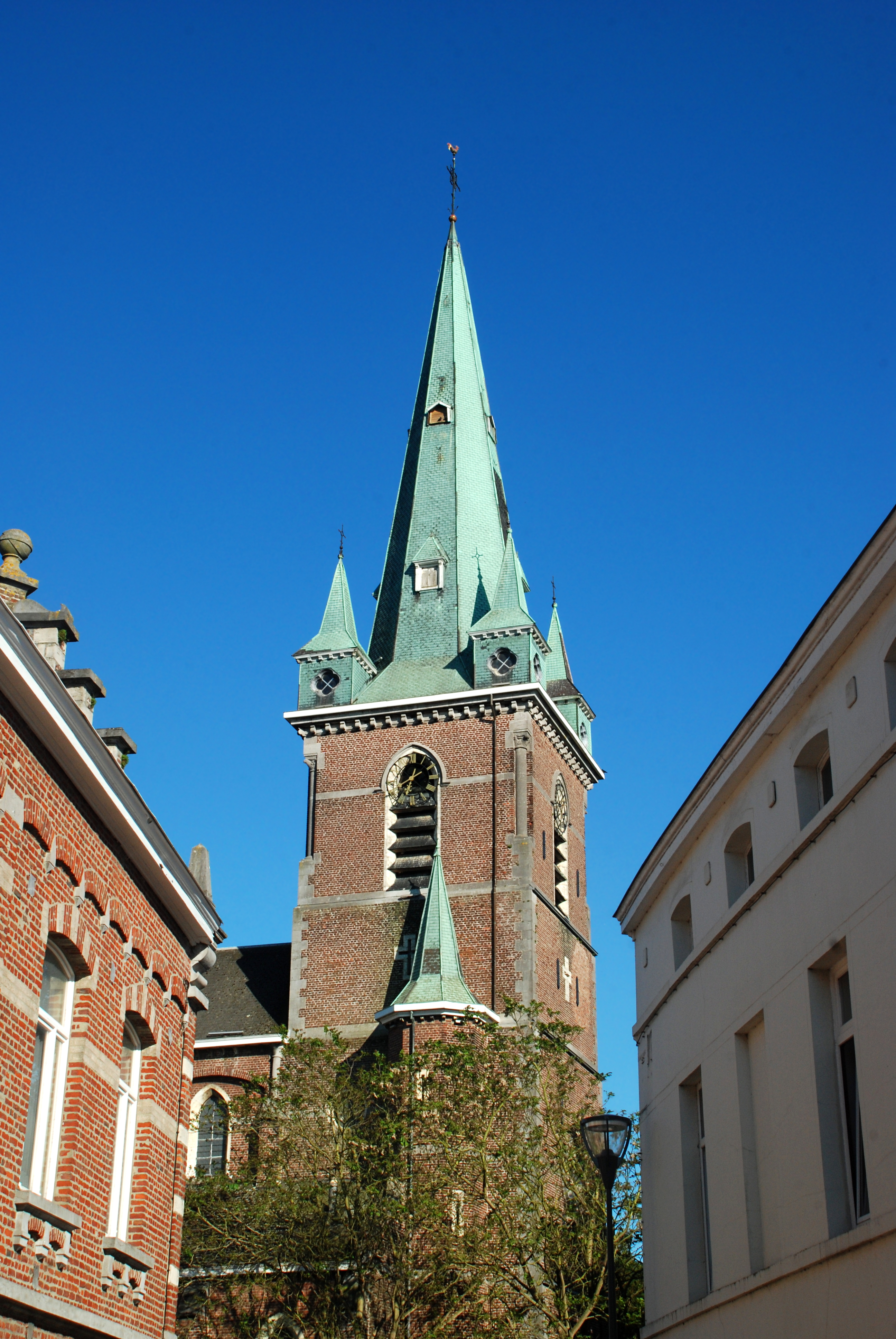 Belgique - Brabant wallon - Villers-la-Ville - Marbais - église Saint-Martin (architecte Émile Coulon)